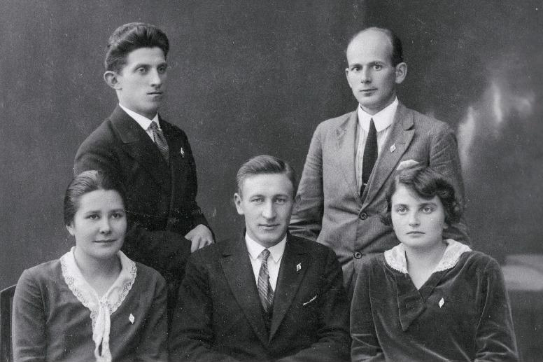 Правление общества русских студентов Тартуского университета, 1930 год